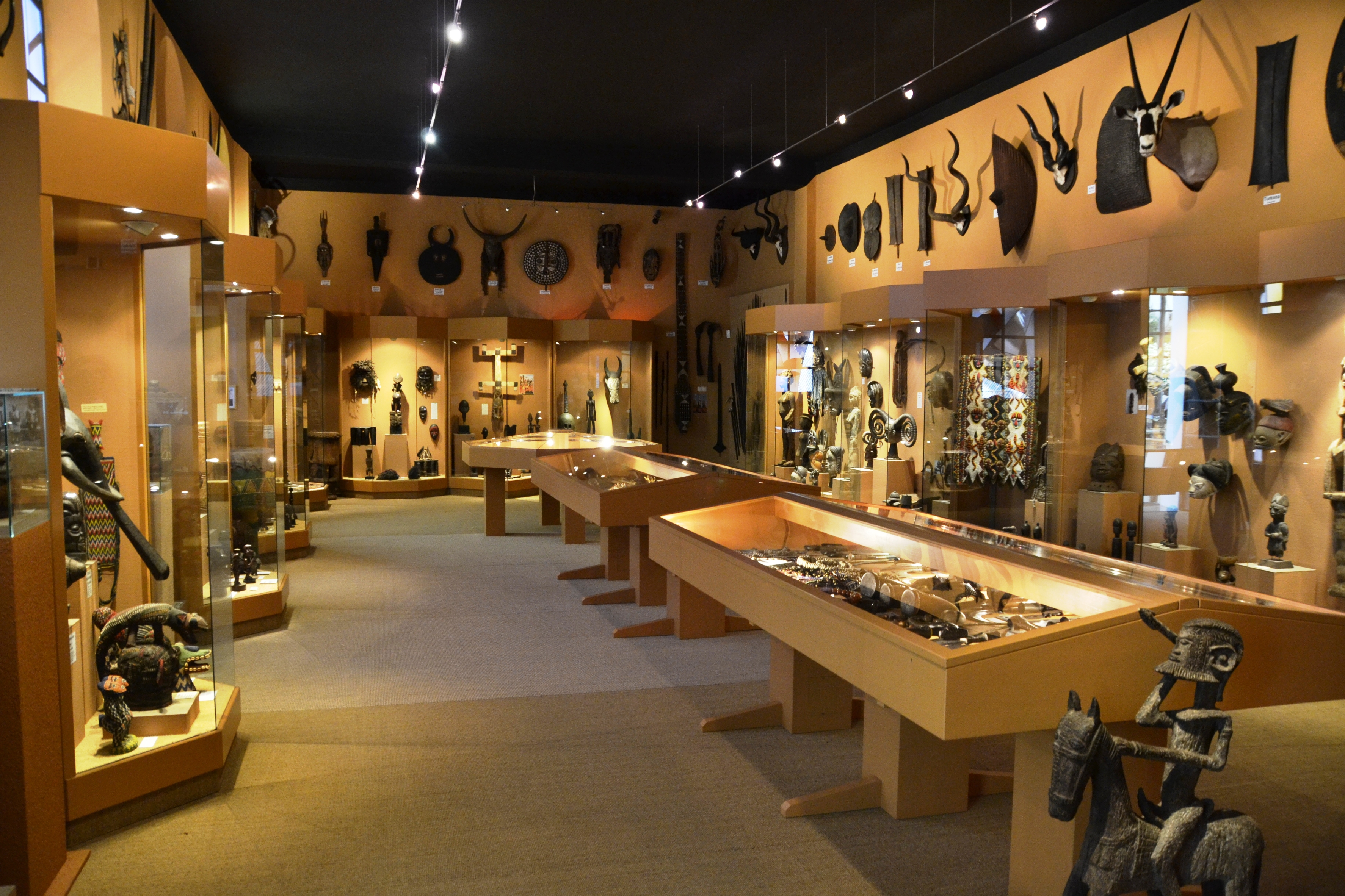 Exponate im Afrikamuseum in Vilshofen an der Donau.